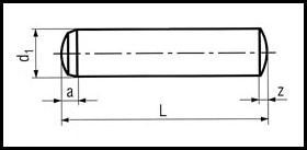 DIN 6325